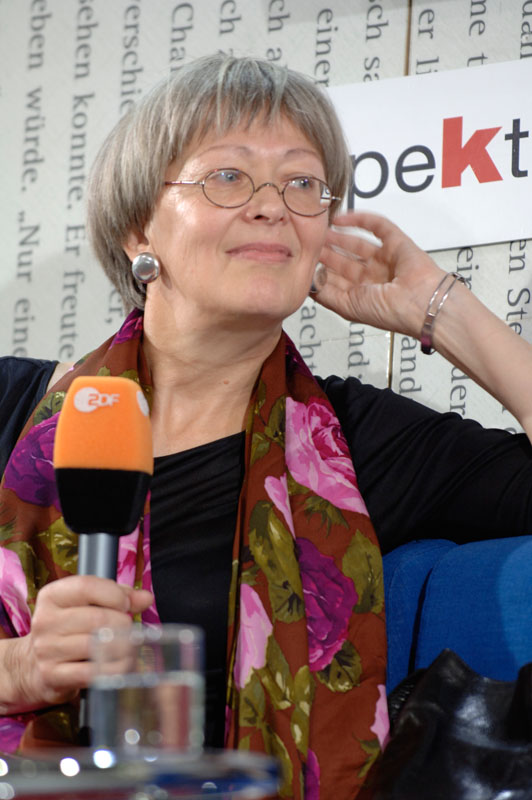 Viola Roggenkamp auf dem Blauen Sofa. Copyright: Das blaue Sofa / Club Bertelsmann